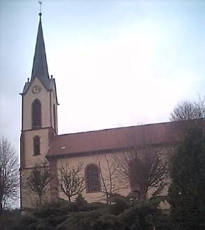 Kirche Günsbach. Foto von Stana Vetsch, Februar 2004.